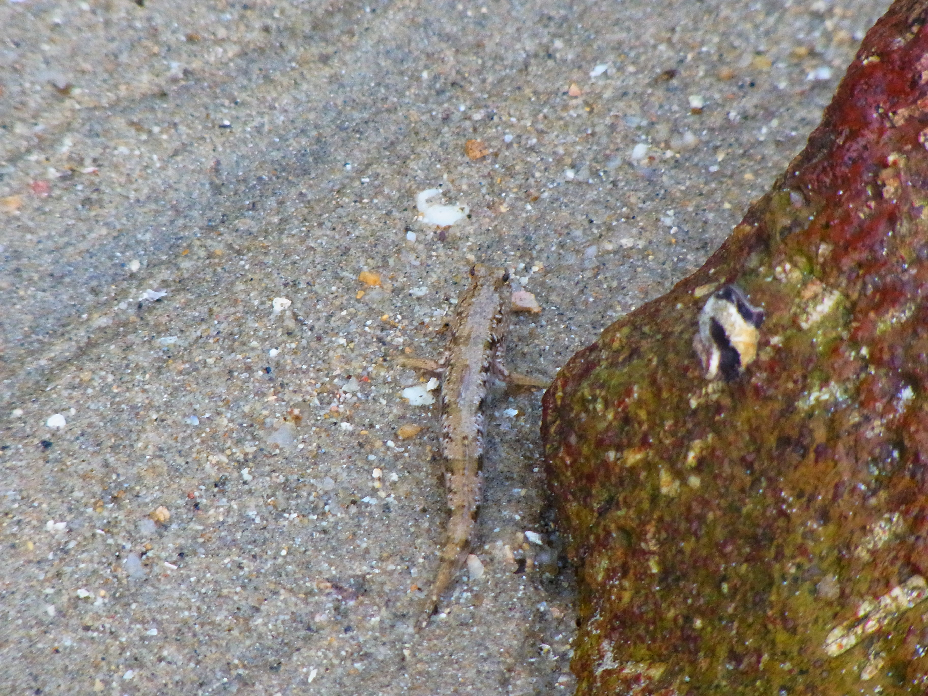 中文（香港）: 沙灘上的廣東彈塗魚